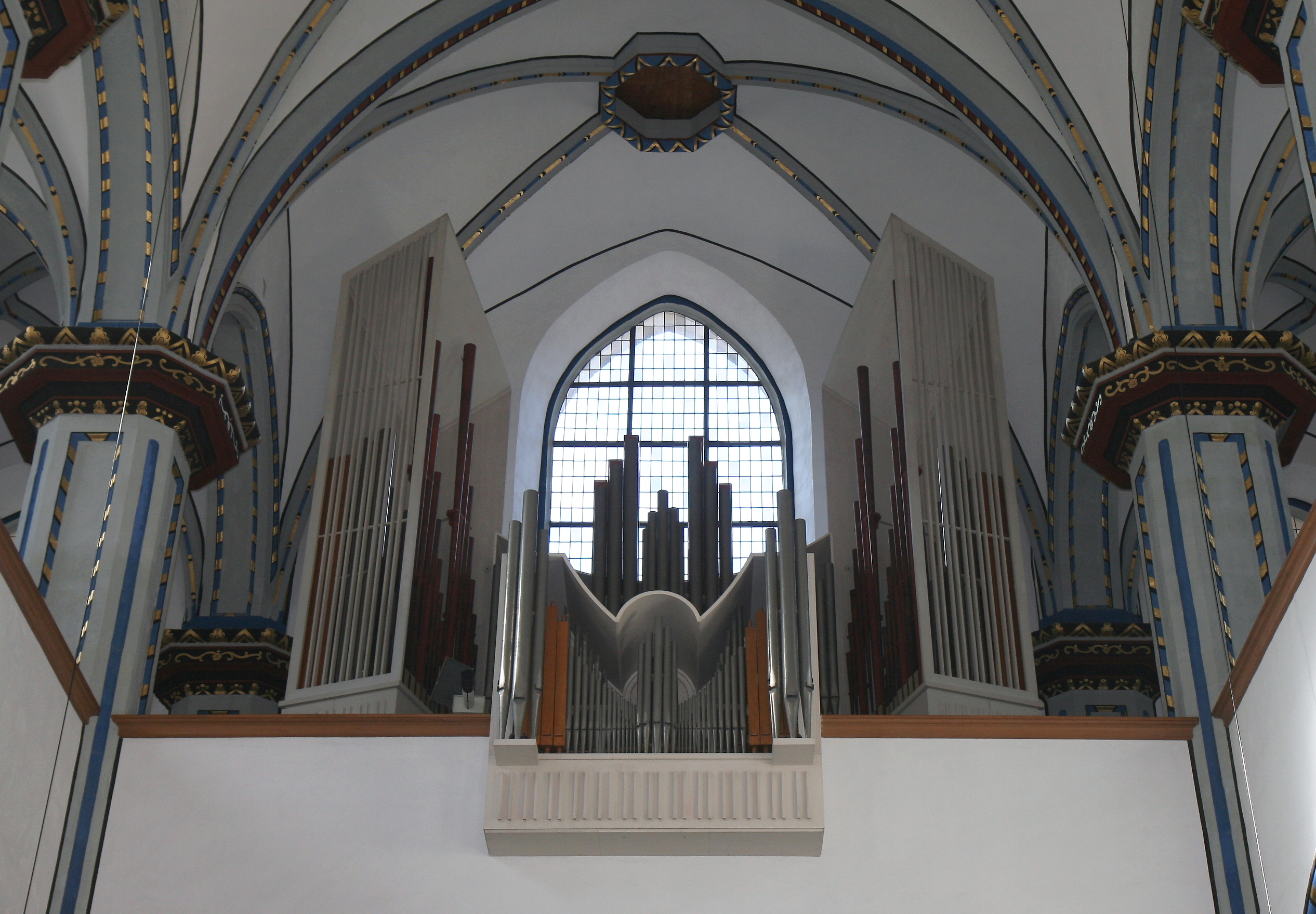 Klais-Orgel (Opus 1147) in der alt-katholischen Namen-Jesu-Kirche (ehemalige Jesuitenkirche), Bonngasse 8 in Bonn. Orgelerbauer Hans Klais (1958), Restauration durch Philipp C. A. Klais (2011).